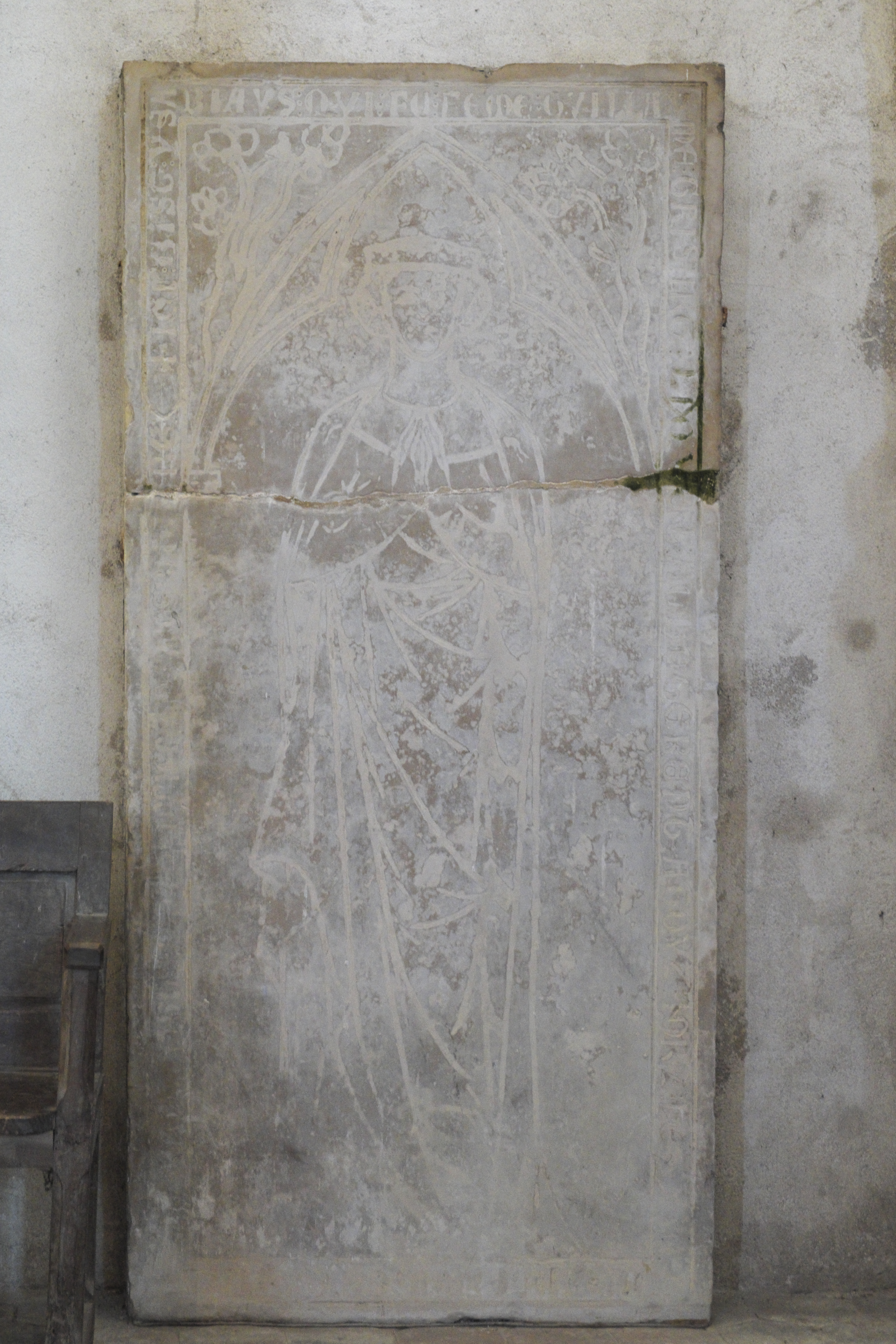 Katholische Pfarrkirche Sainte-Geneviève in Héricy im Département Seine-et-Marne (Île-de-France/Frankreich), Grabstein aus dem 13. Jahrhundert